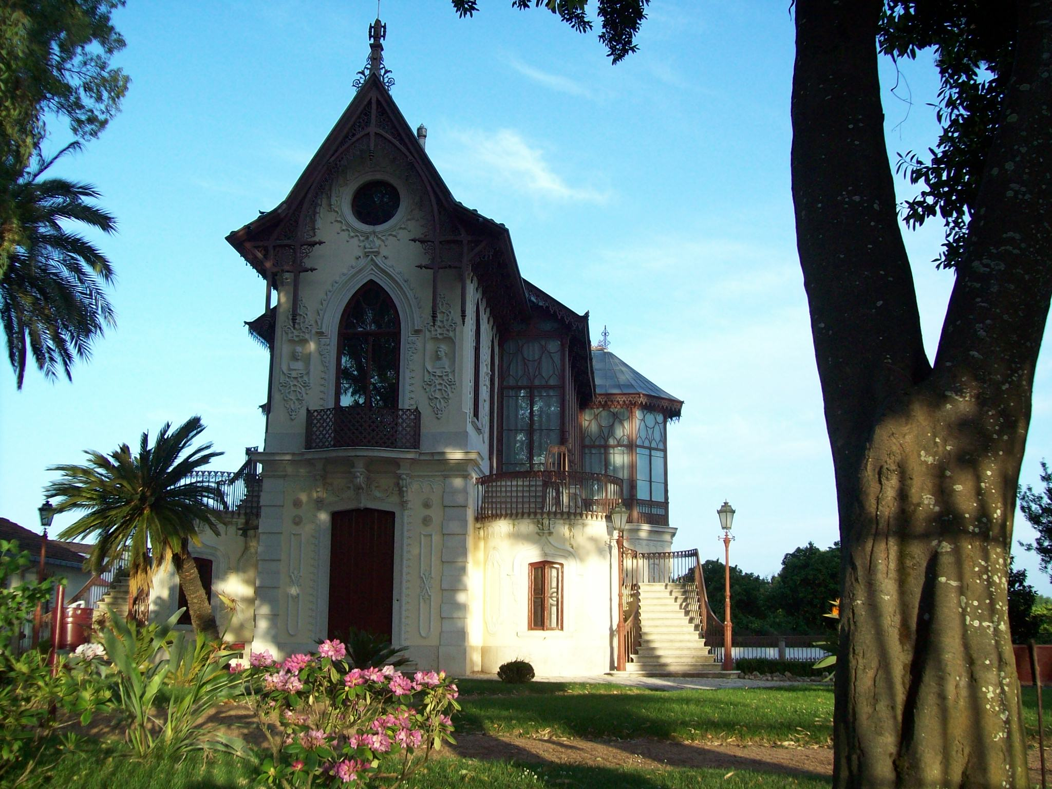 Golegã - Casa Museu José Relvas